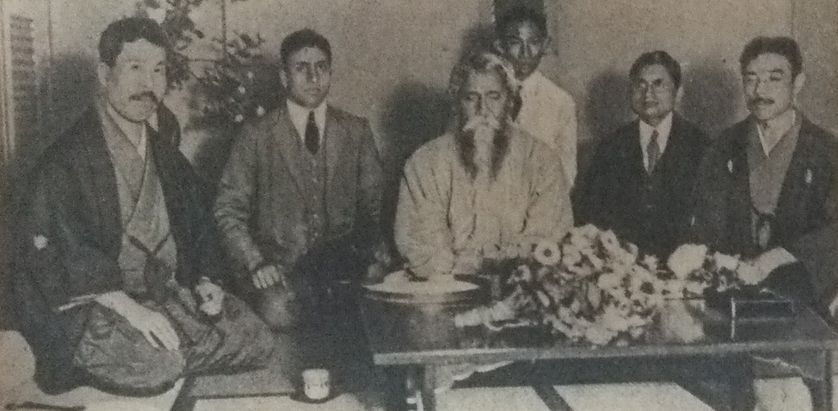 1916年の訪日時のラビンドラナート・タゴール。右端に横山大観。